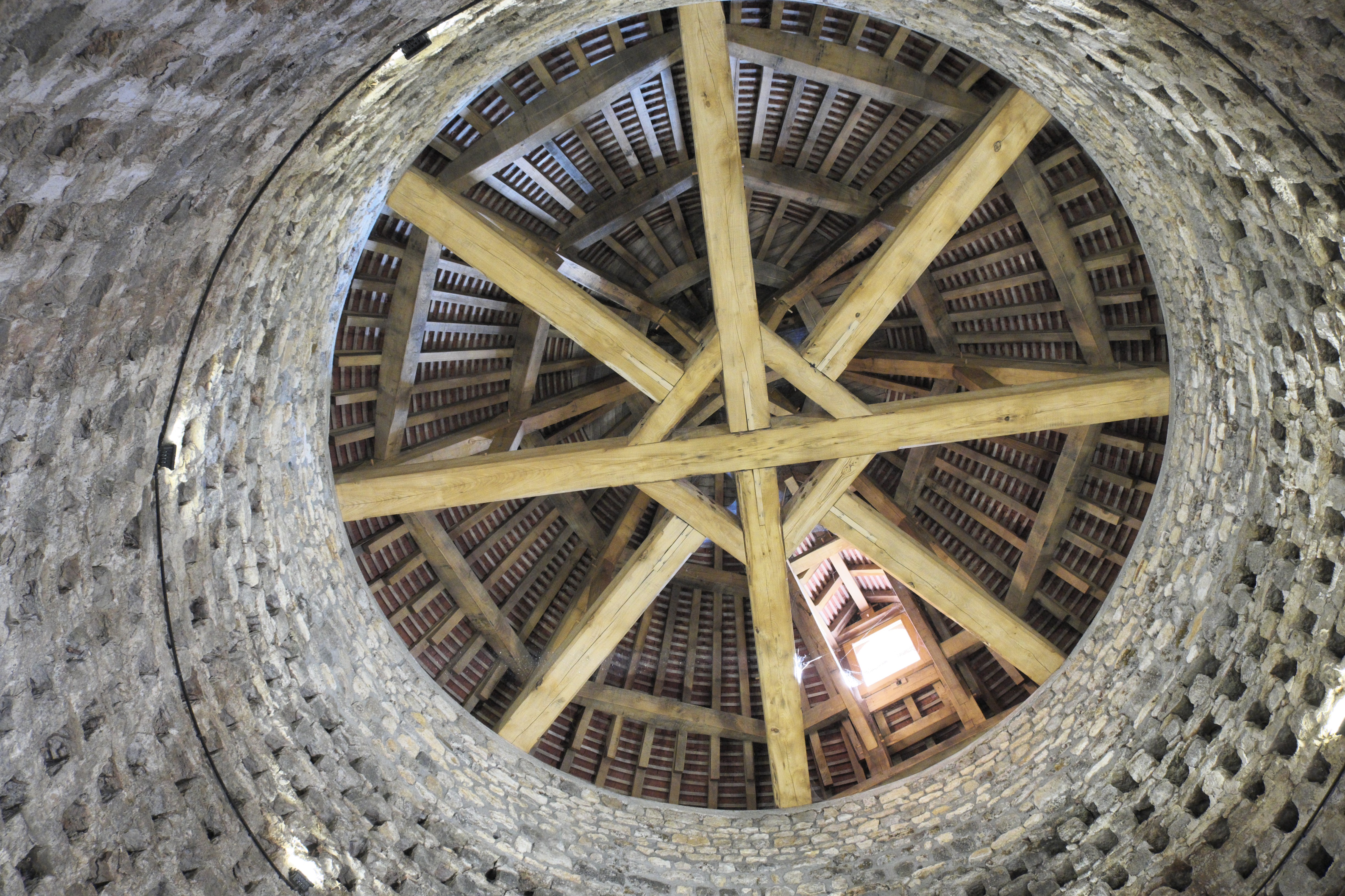 Taubenturm in Brières-les-Scellés im Département Essonne (Île-de-France/Frankreich)